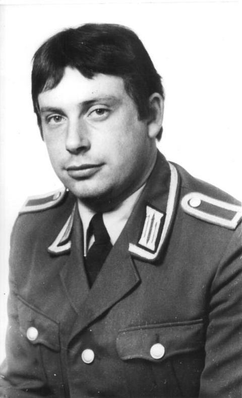 ADN-ZB / 4.8.81 / Berlin: Der Feldwebel Klaus-Peter Braun ist am 1. August 1981 in Ausübung seinen verantwortungsvollen Dienstes zum Schutz der Staatsgrenze der DDR ermordet worden. Information added by Wikimedia users.